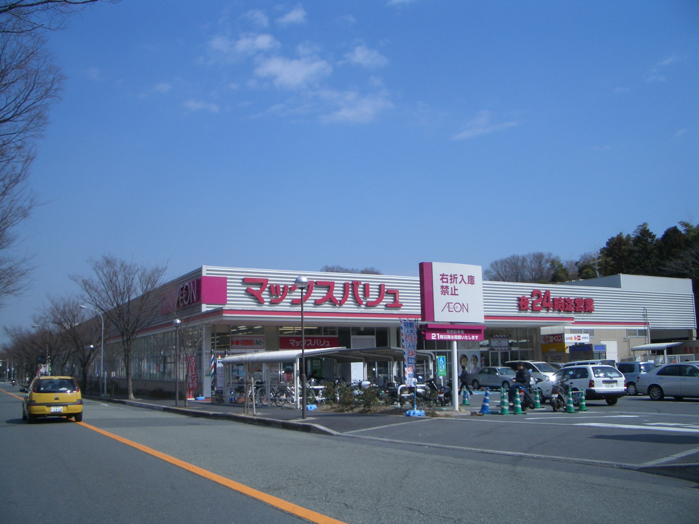 MaxValu Suita Senrioka,Senriokakita Suita-City Osaka Japan.